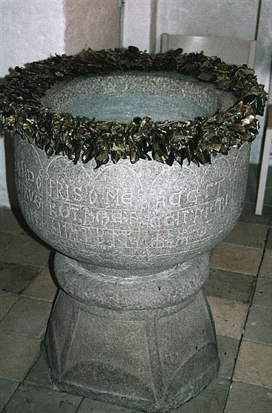 Bårse Kirke i Danmark. Bårse kirke, døbefont